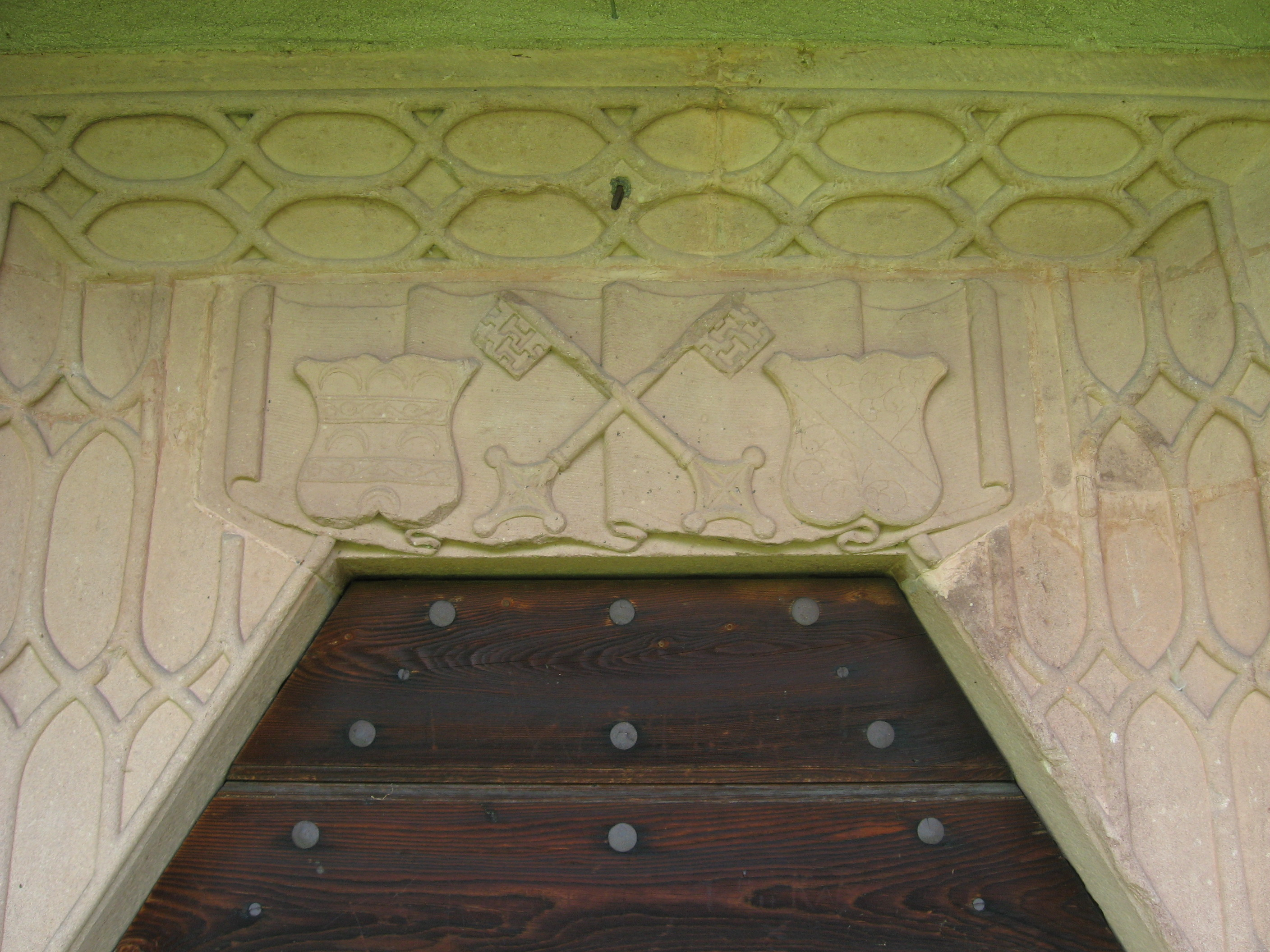 St. Peter am Bichl in Völs (Südtirol) Detail der Tür